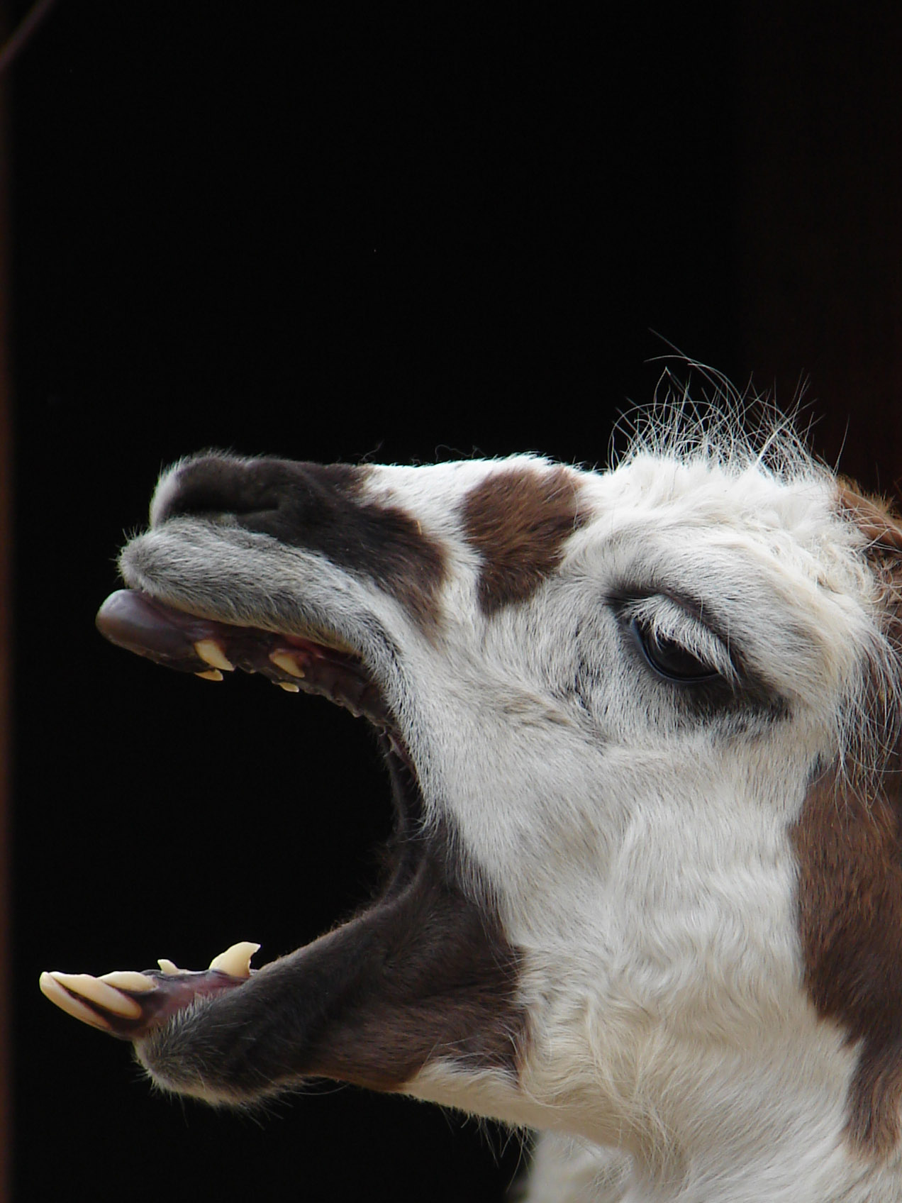 Lama